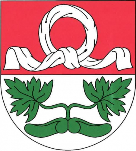 znak, Javorník, okres Benešov